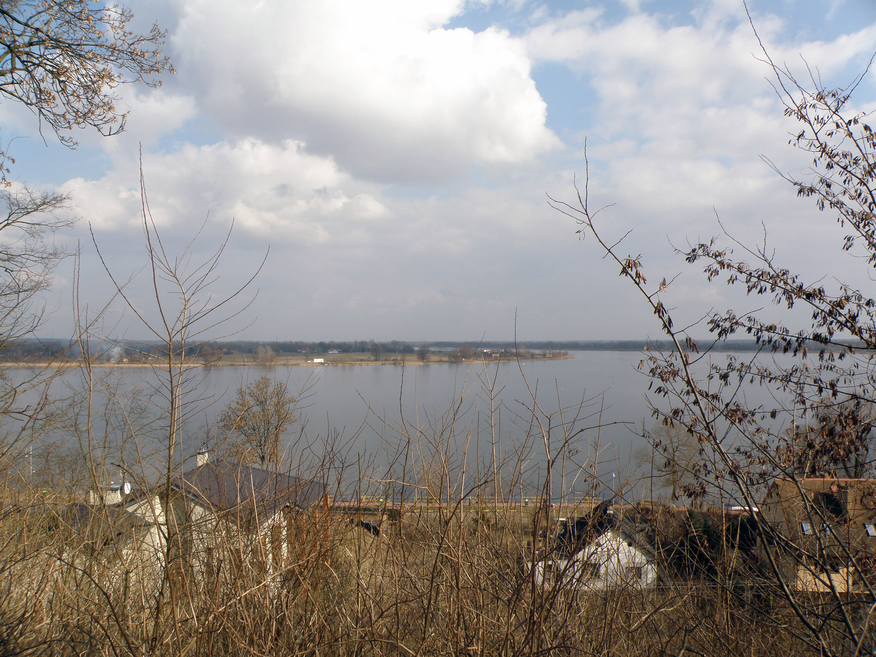 Serock (woj. mazowieckie, powiat legionowski) - widok na Narew, w oddali widoczne ujście rzeki Bug.